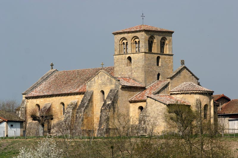 Vue générale de l'église d'Iguerande prise du sud